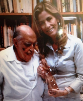 "Obelisco FI": estatuilla del máximo galardón de la arquitectura en Costa Rica, otorgado a Oscar Niemeyer en su aniversario 100.